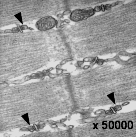 Figura 5. El Retículo Sarcoplasmático (SR) en los músculos esqueléticos de los ratones. (A) Micrografías electrónicas representativas de secciones ultrafinas longitudinales de ratones WT. Aumento: x5.000